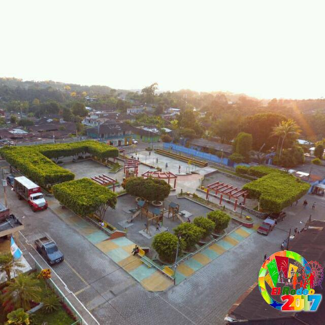 Parque central del municipio